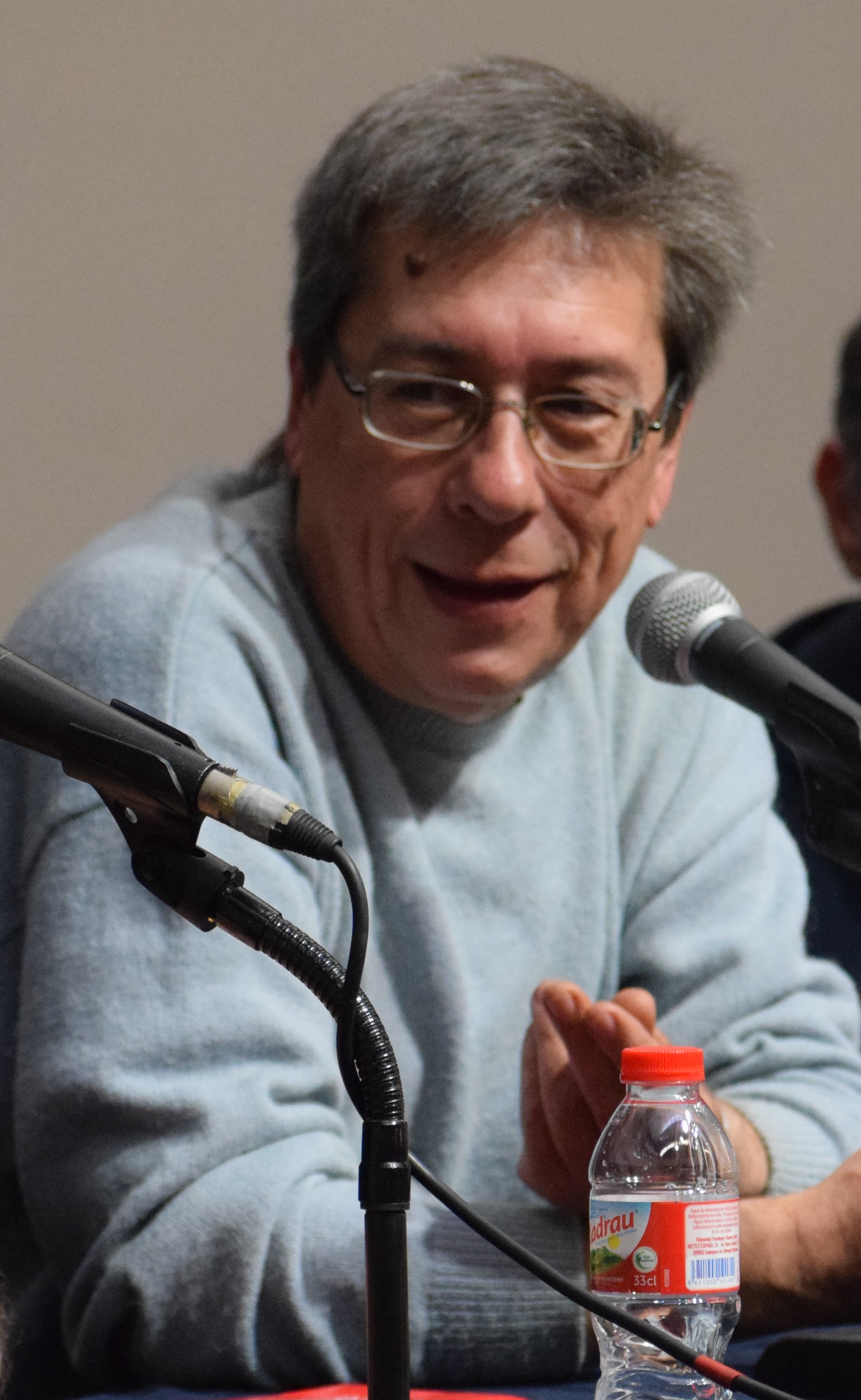 El guionista Francisco Pérez Navarro (conegut per Efepé) i l'escriptor Javier Pérez Andújar, a la taula rodona "Tots volem un TBO". Saló Internacional del Còmic de Barcelona de 2017. Divendres 31 de març de 2017.